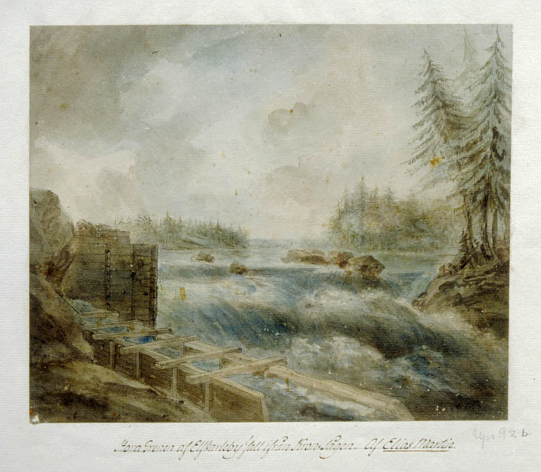 Älvkarlebyfallen på 1790-talet. Stora Grenen af Elfkarleby fall ifrån Kron Sågen. af Elias Martin. Akvarellerad pennteckning av Elias Martin.